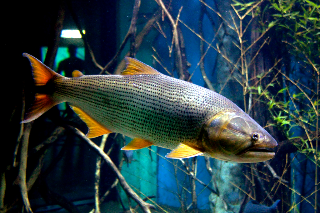 Dourado no Aquário de Belo Horizonte.